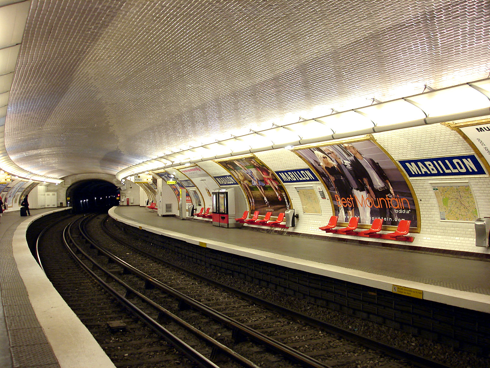 Station Mabillon, de la ligne 10 du métro de Paris, France.